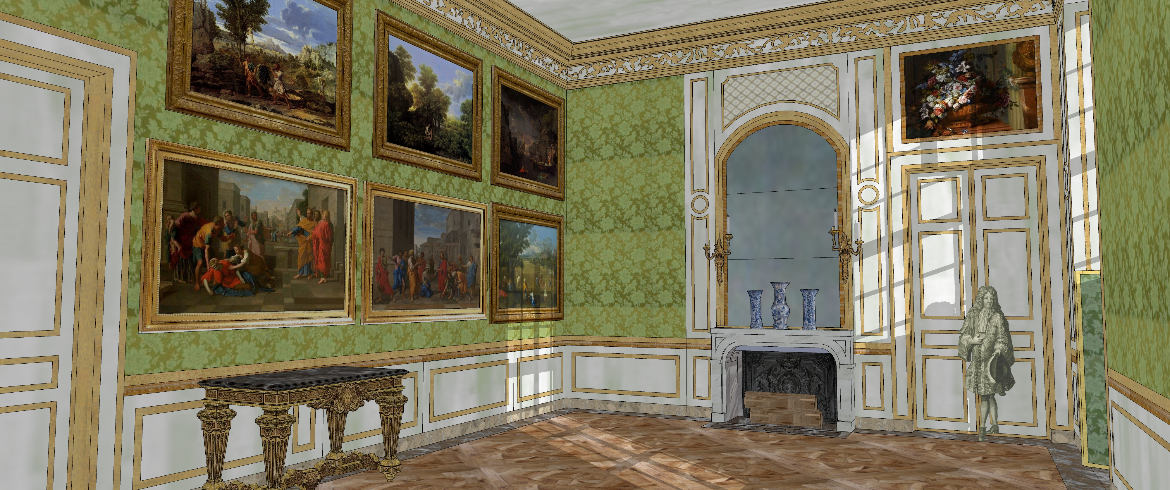 Essai de restitution de la première antichambre de Monseigneur au Château-Neuf, vers 1709-1711.